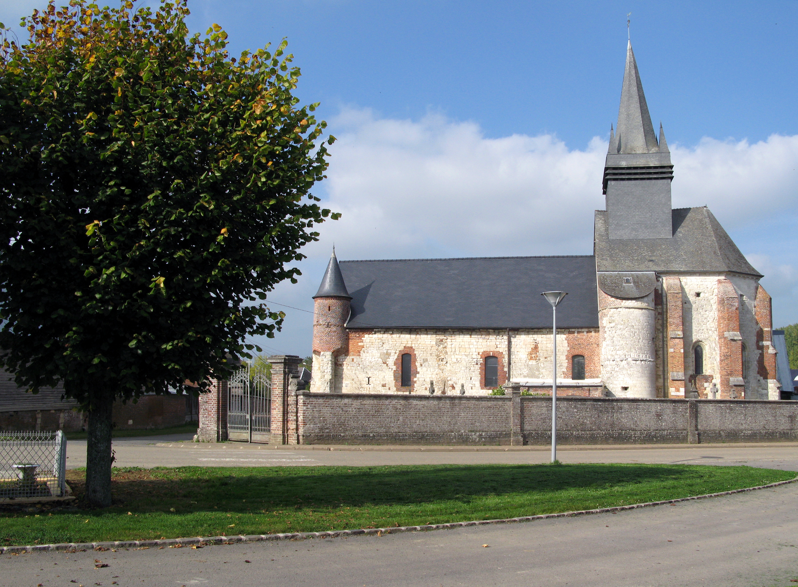 Morgny-en-Thiérache (Aisne, France) - L'église Saint-Nicolas. . . .